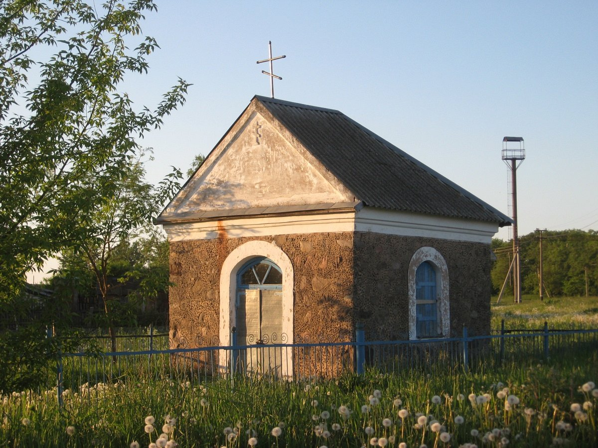 Гарадзея. Прыдарожная капліца